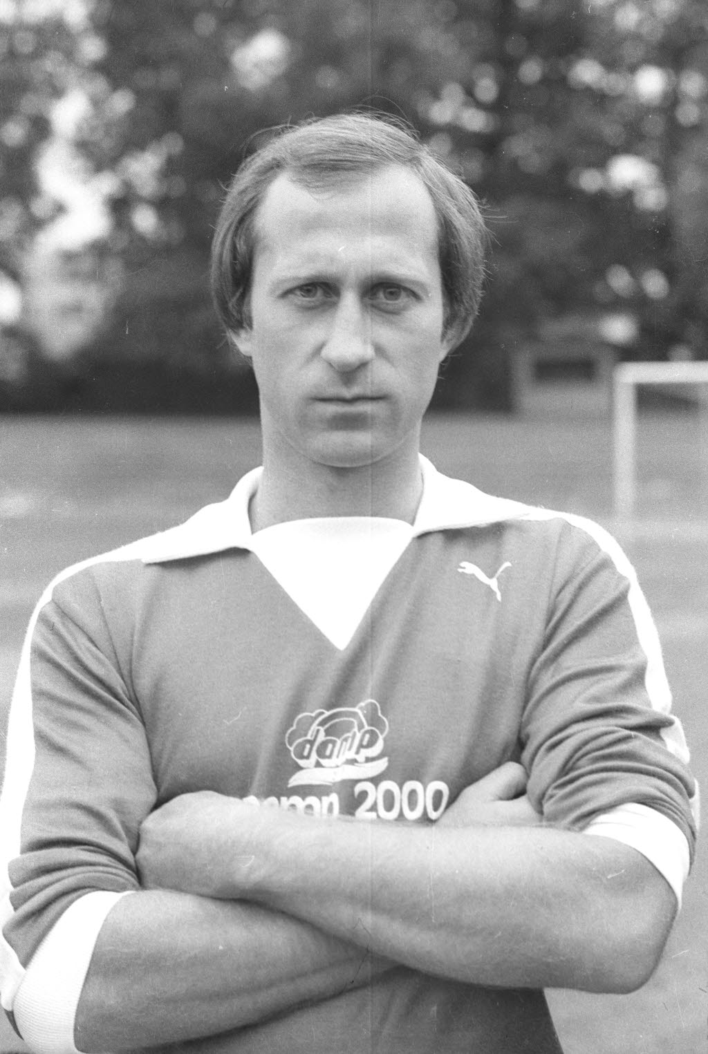 Fußballspieler von Holstein Kiel in der Saison 1978/79.